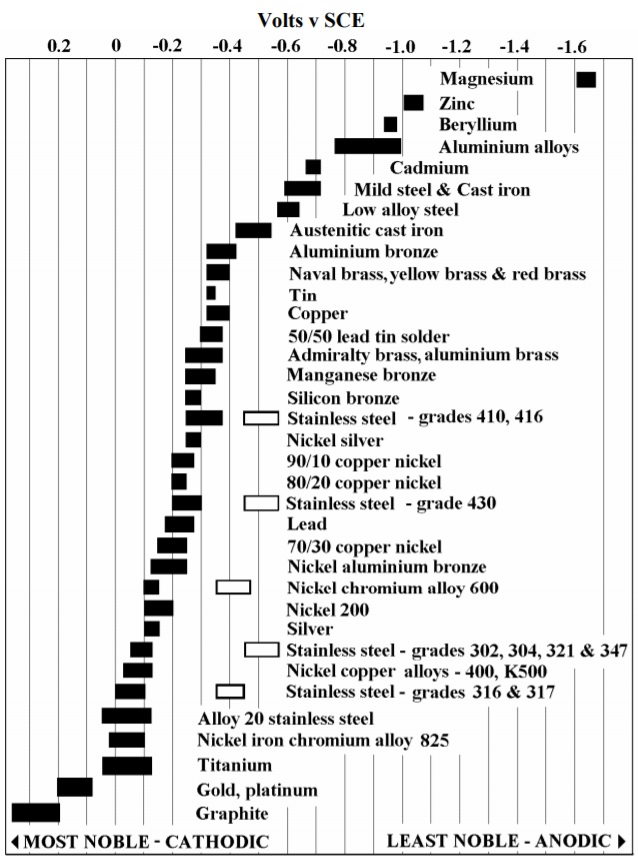 galvanik serisini gösteren tablo